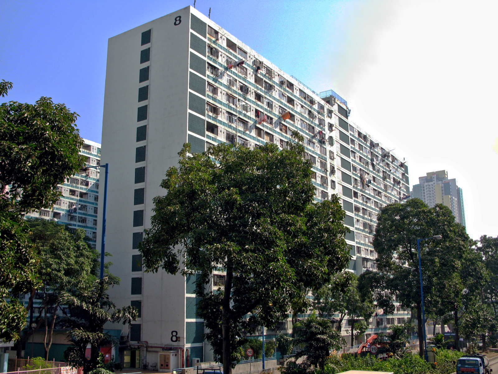 Lower Ngau Tau Kok Estate Block 8 牛頭角下邨第8座